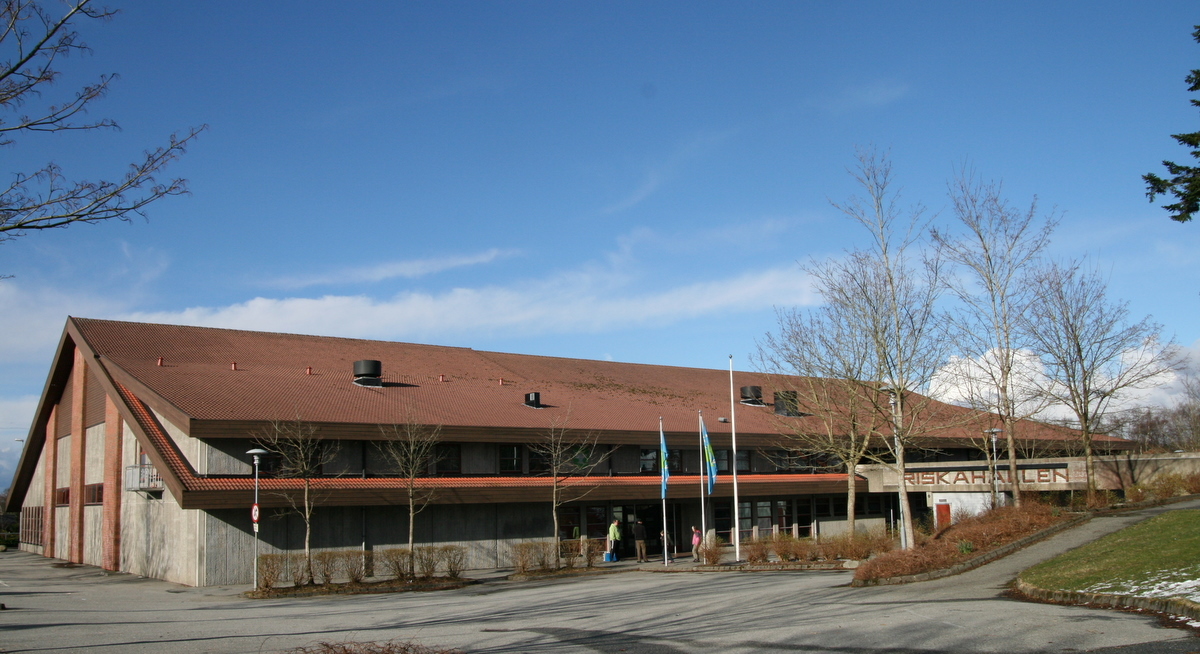 Riskahallen